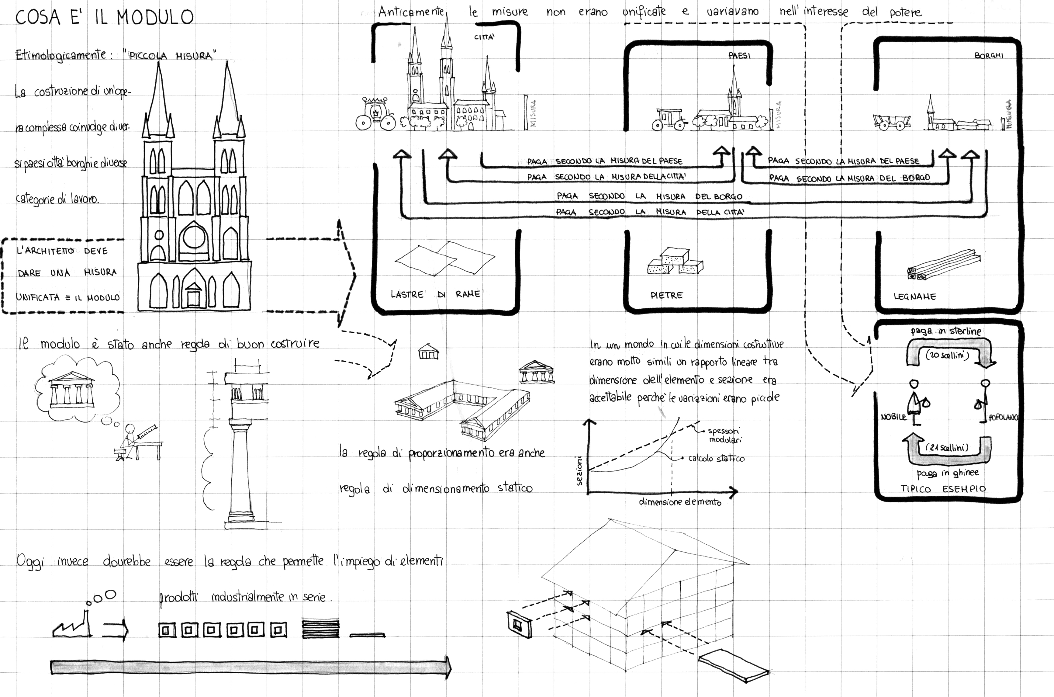 sintesi dell'essenza del modulo in architettura